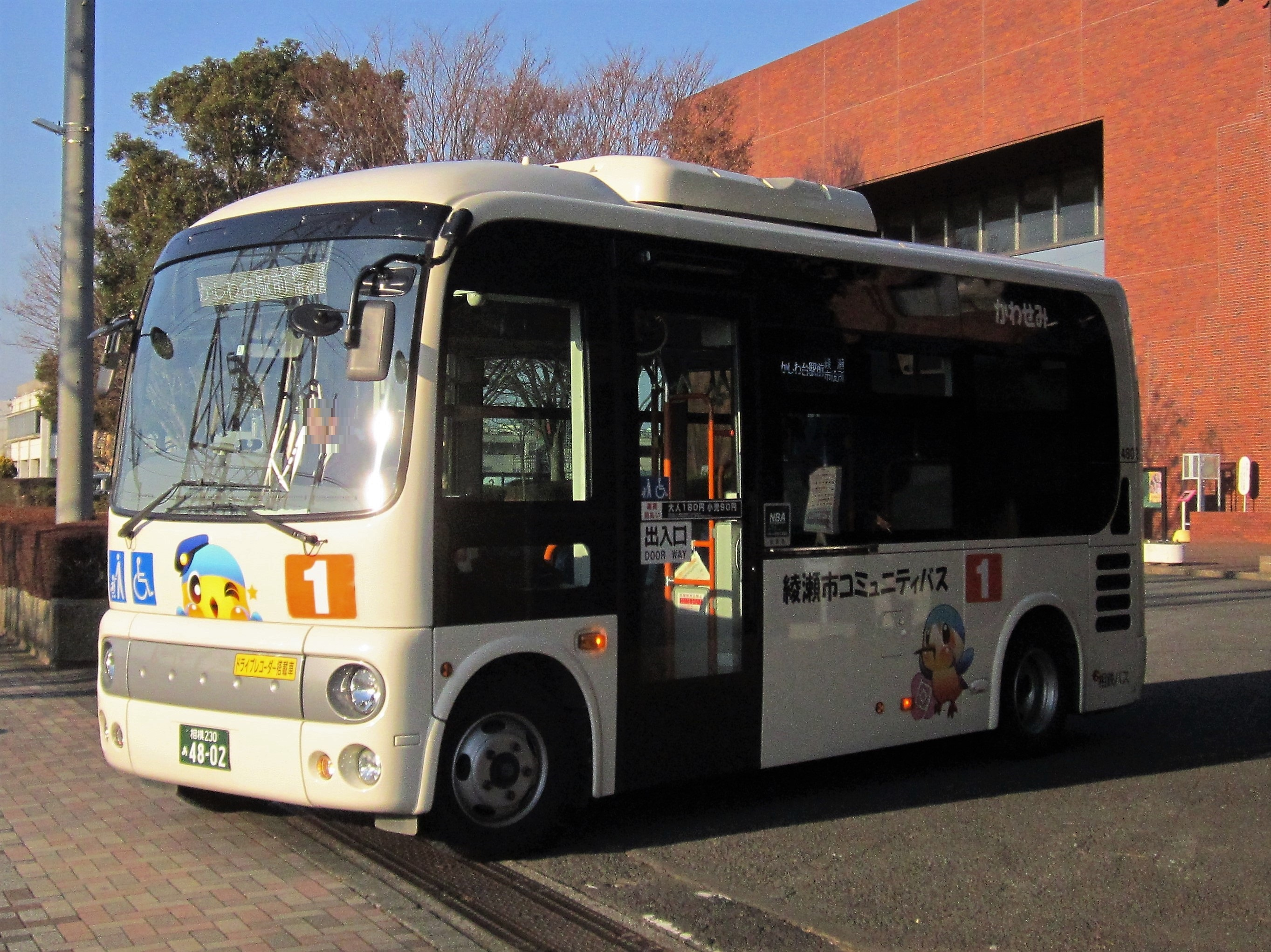 綾瀬市コミュニティバス1号車（相鉄バス・綾瀬市オーエンス文化会館にて） Canon PowerShot A2200